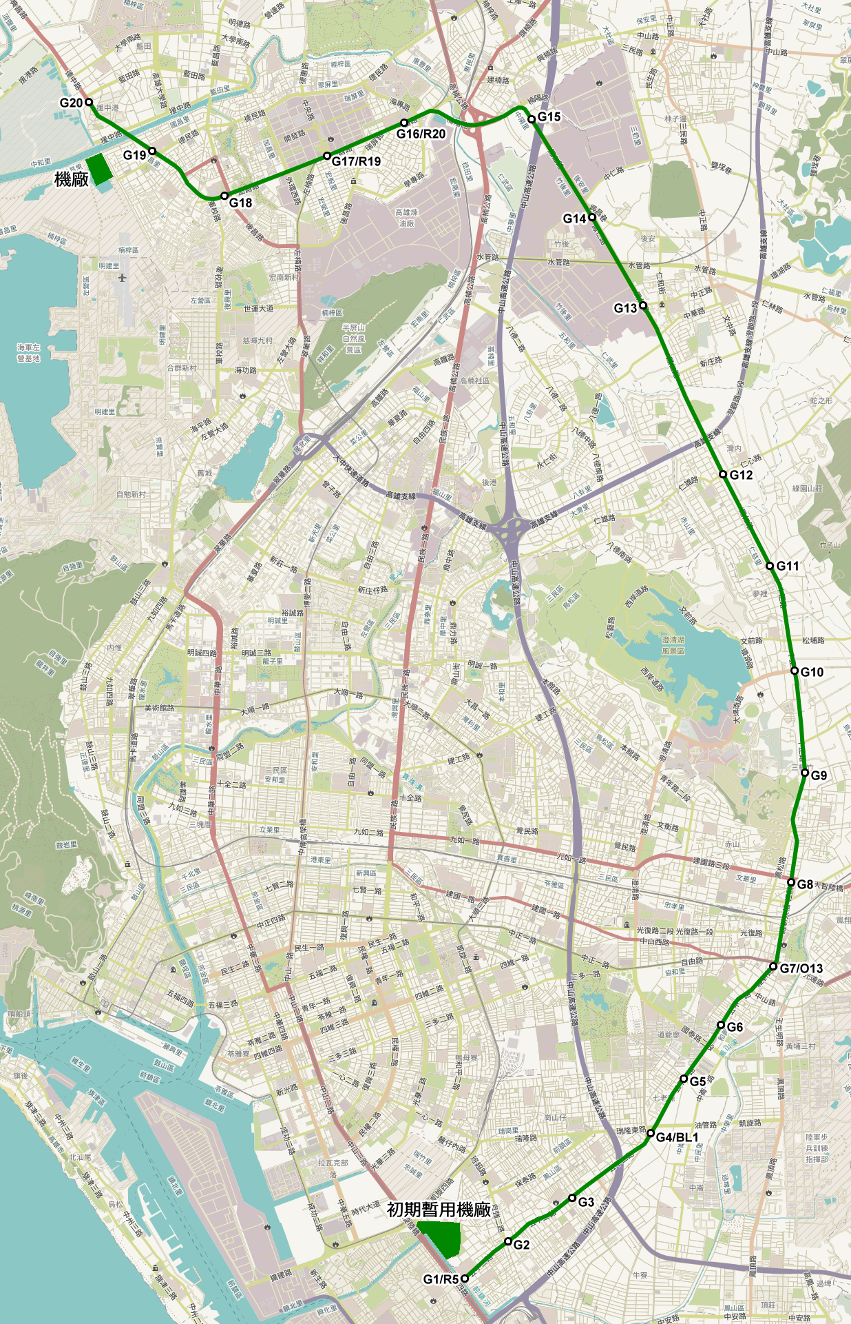 2002年版本的高雄捷運綠線